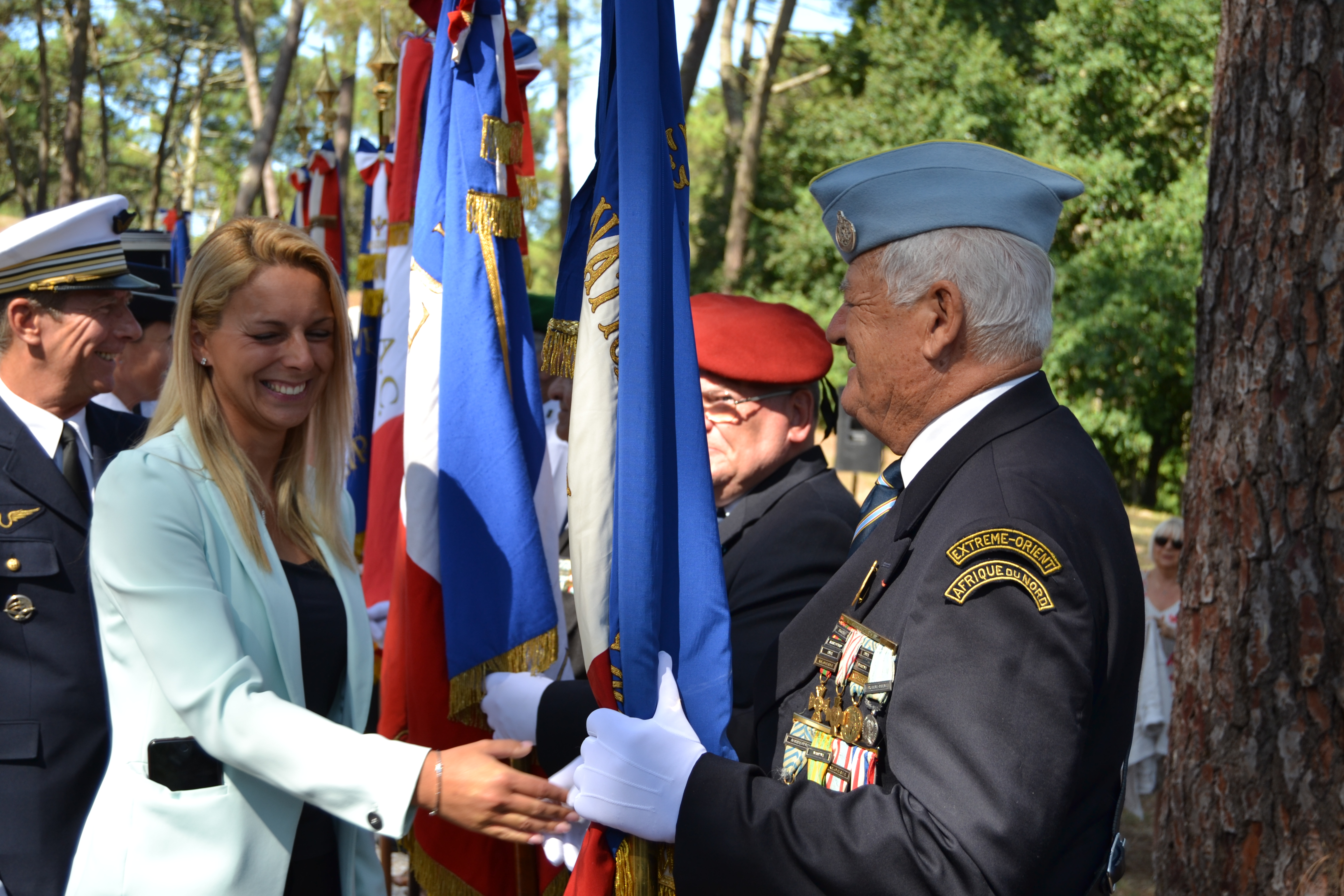 Cérémonie du 23 août 2019 nécropole nationale de la teste de buch,hommage aux Tirailleurs Sénégalais.Edwige Diaz remerciant les porte-drapeaux .